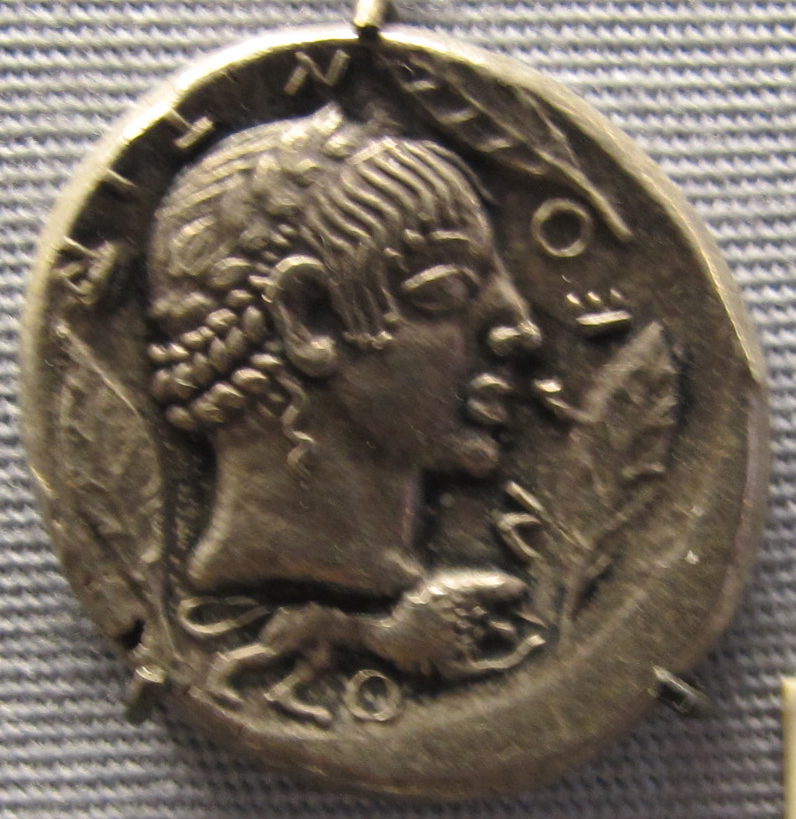 Leontinoi, tetradracma, 480 ac. ca testa